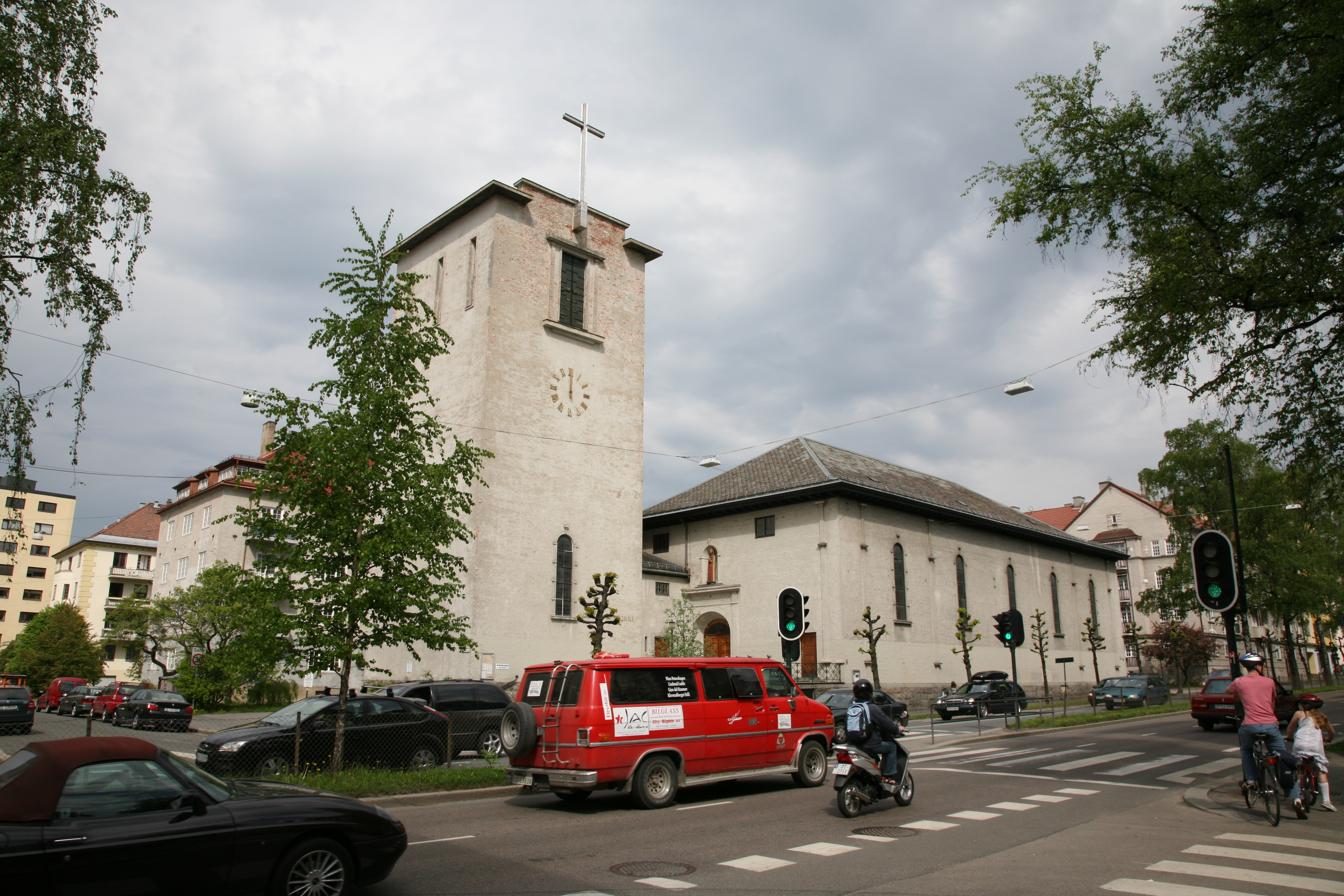 Majorstuen kirke, a church at Kirkeveien, Oslo